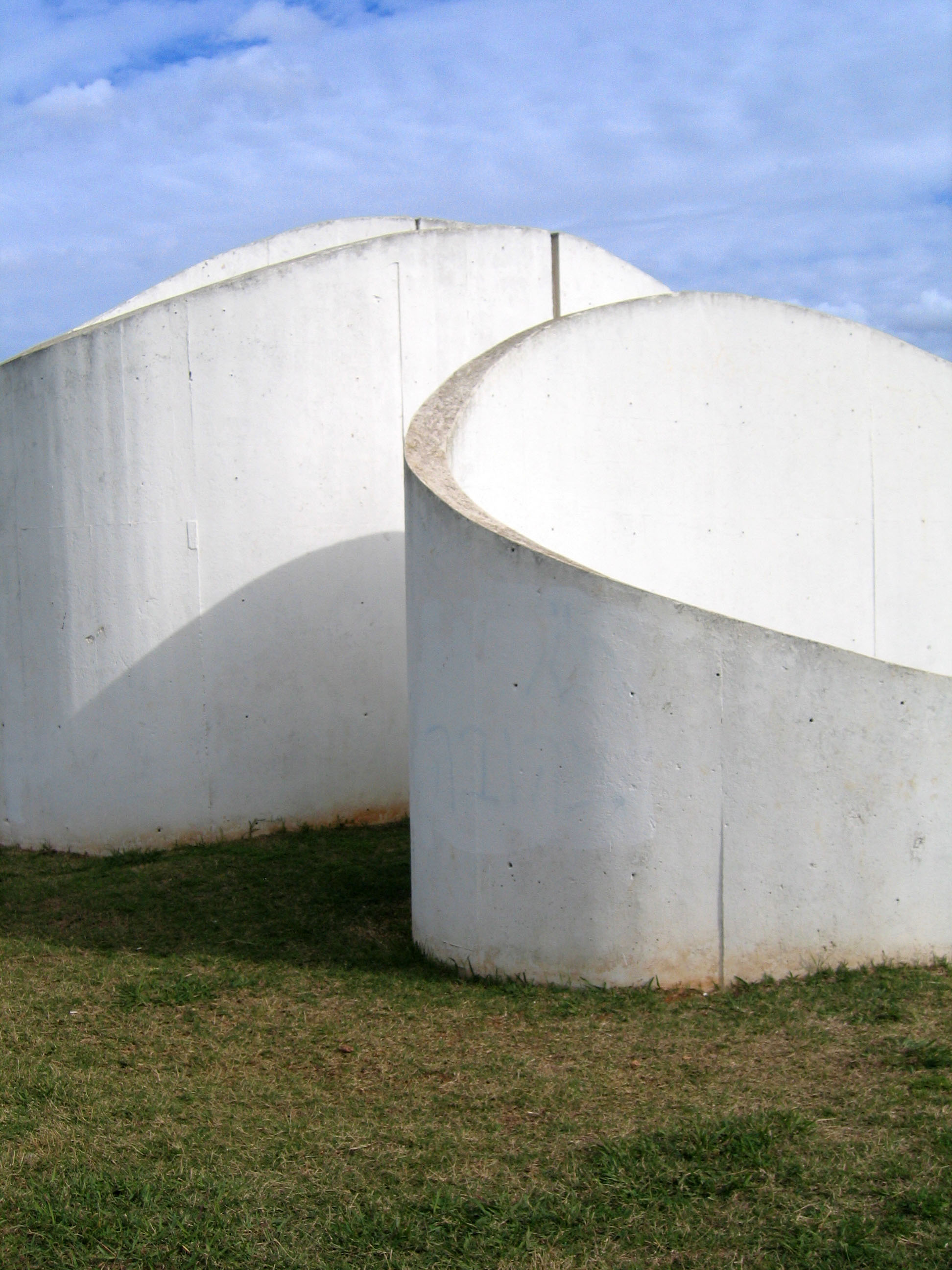 Sculpture